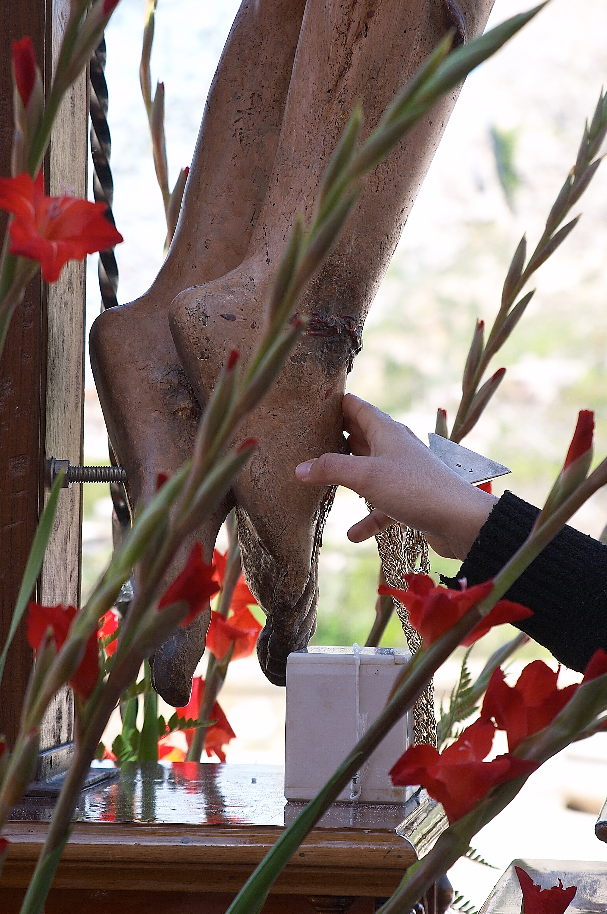 Dedizione religiosa